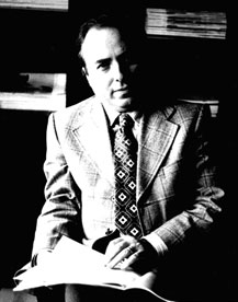 Foto autore